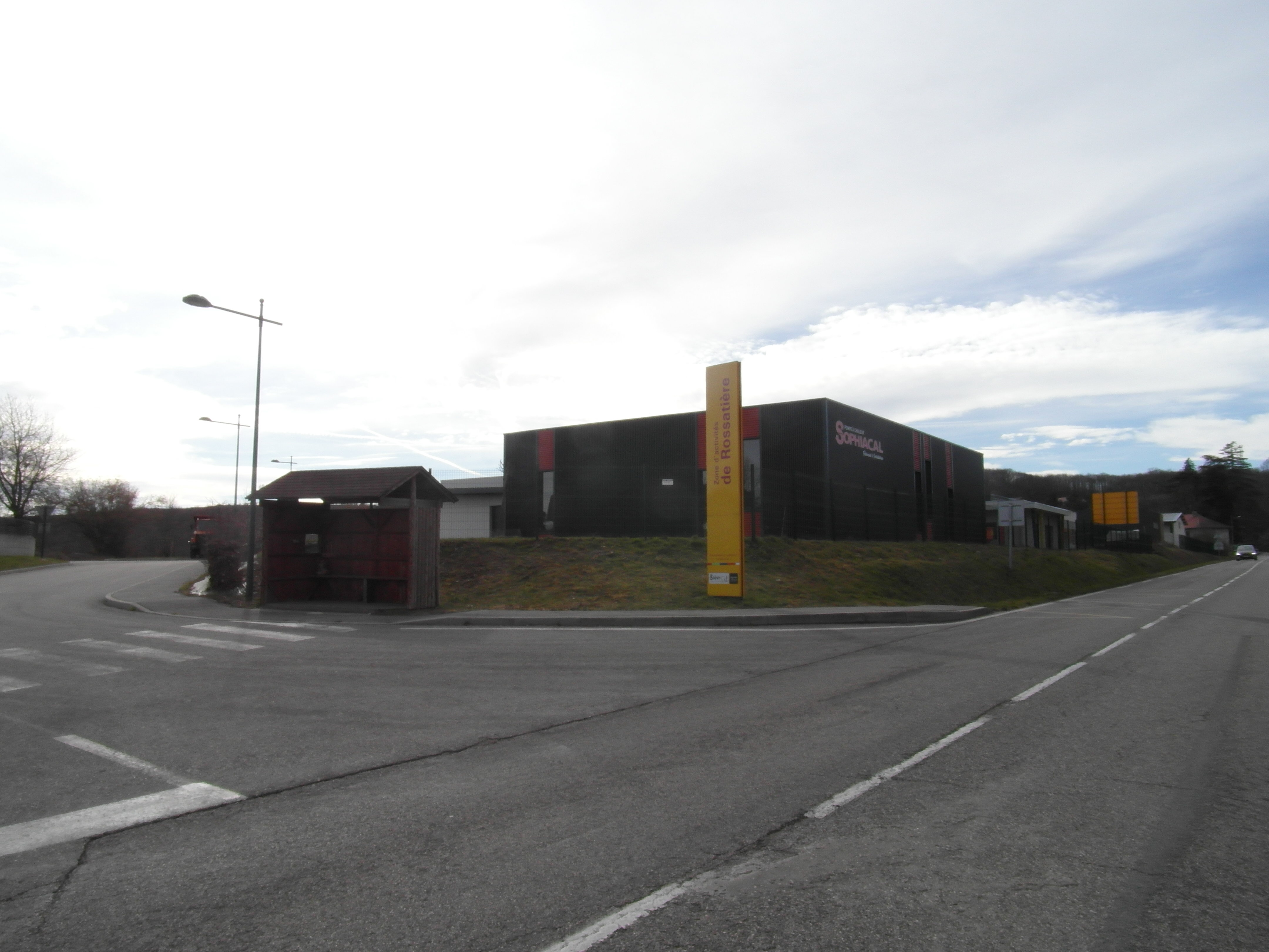 ZA Rossatière à Chabons en mars 2019